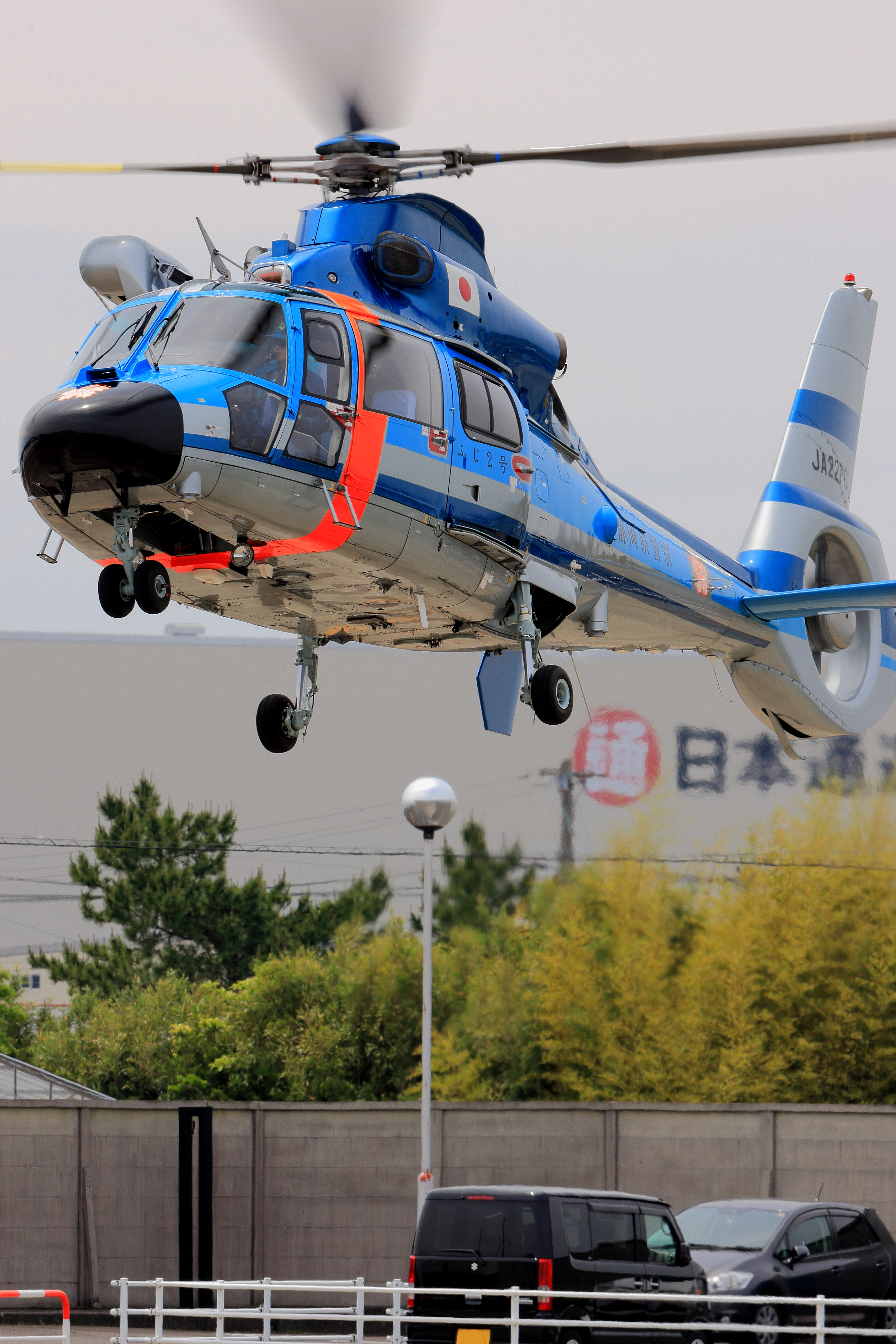 静浜飛行場で撮影された、静岡県警察航空隊 Eurocopter AS365N1 Dauphin 2